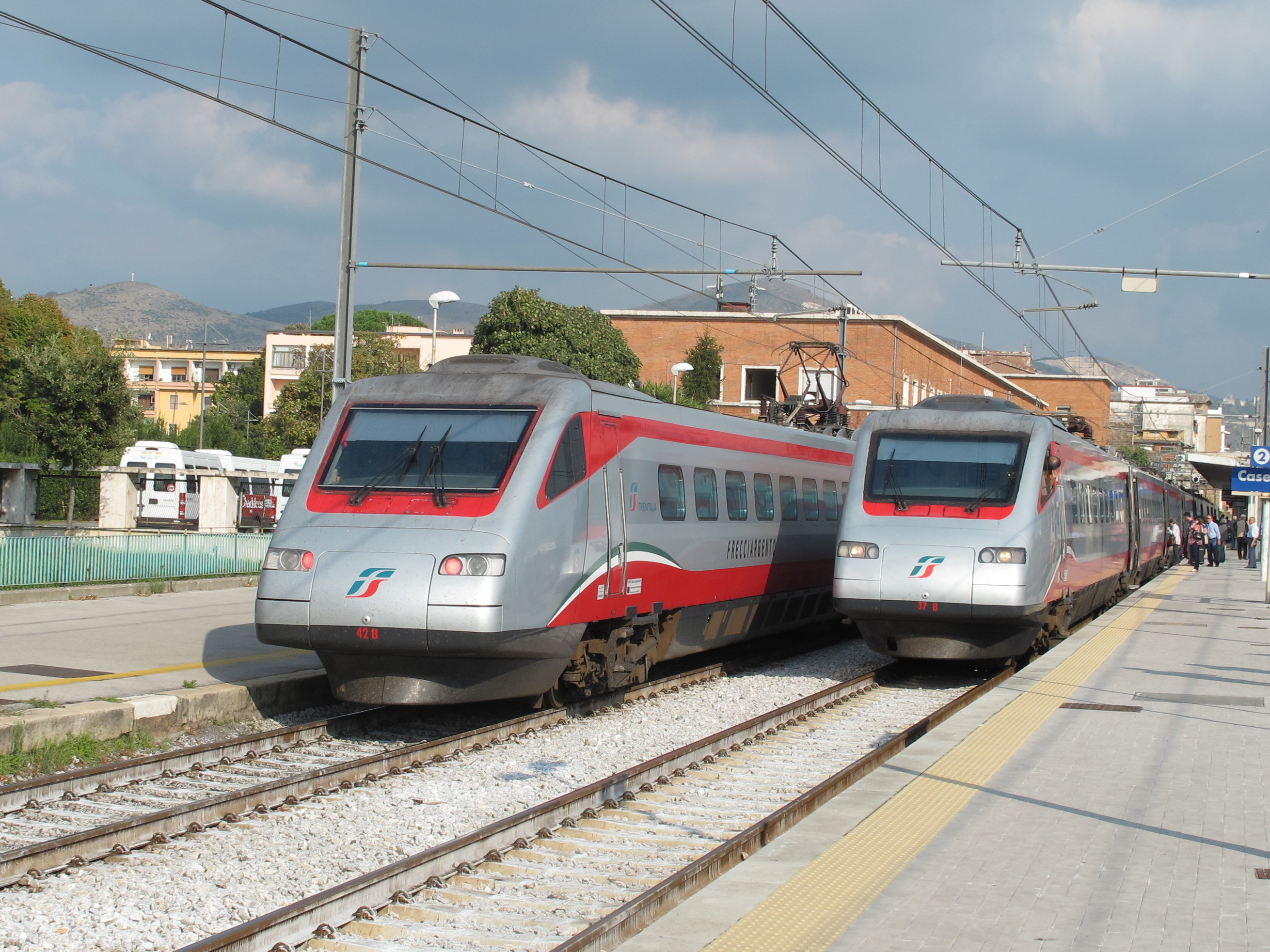 FS ETR480 - Begegnung in Caserta